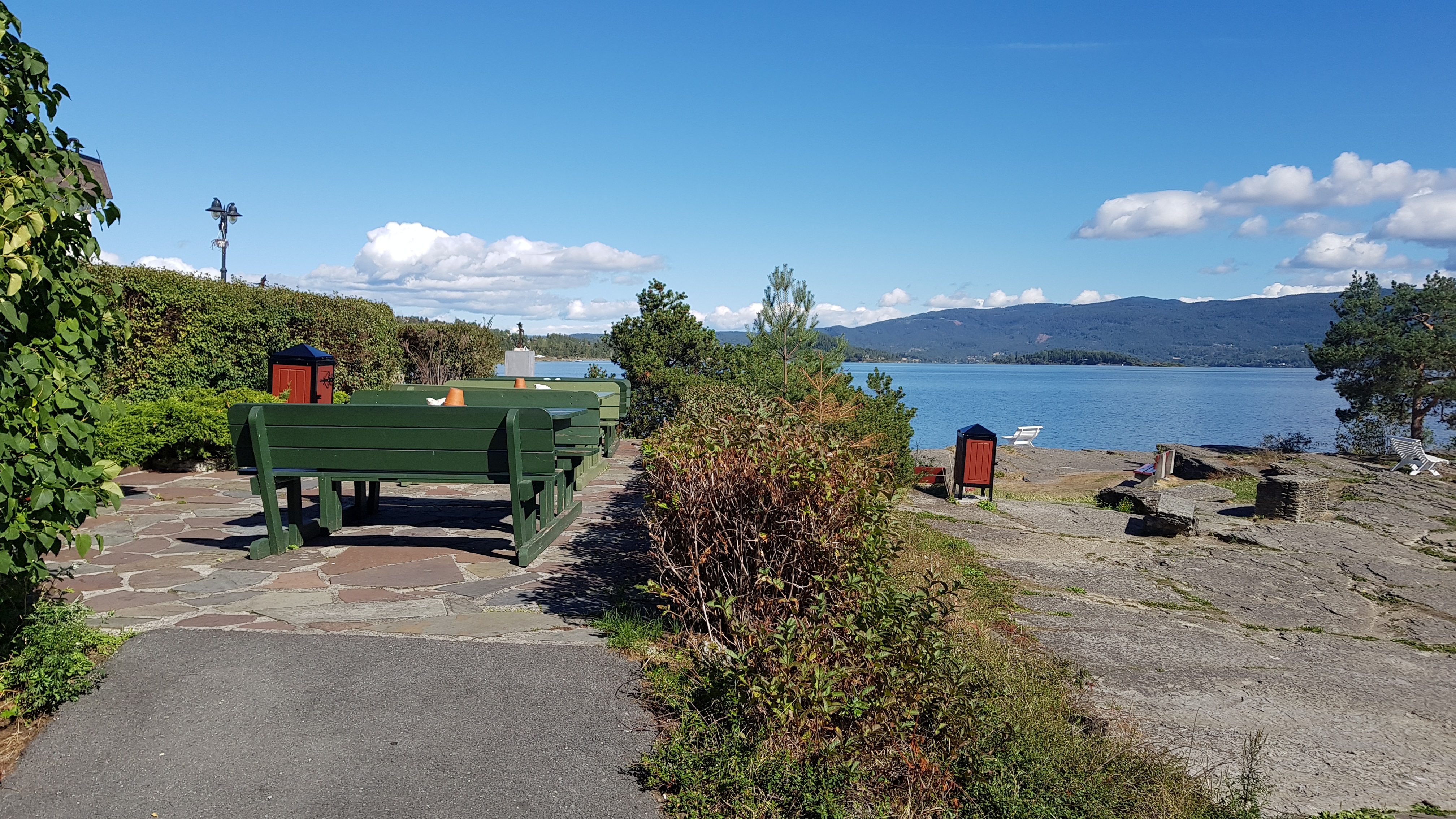 Garntangen har godt med sitteplasser ut, der besøkende kan nyte gatekjøkken maten